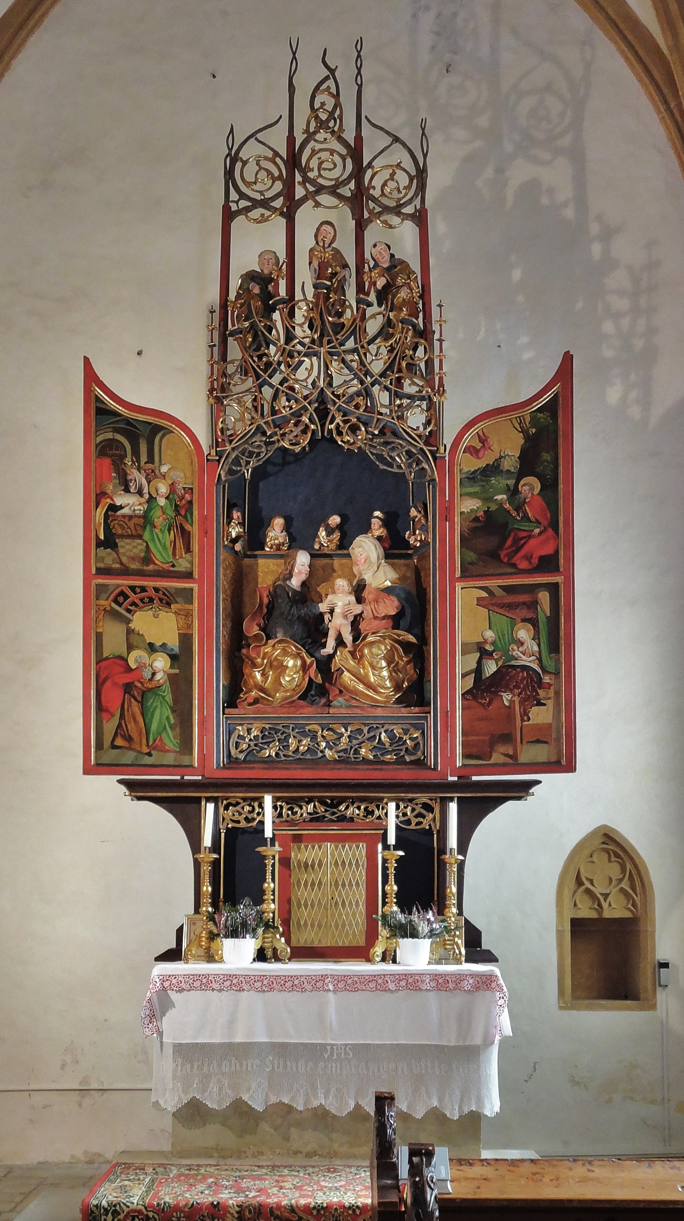 Kath. Pfarrkirche St. Leonhard im Lavanttal, Annen-Altar